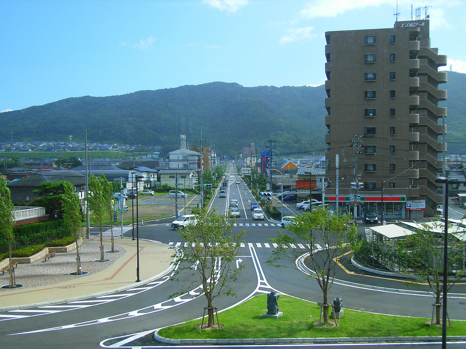 Miyagi Prefectural Road 135, Ochiaiteishajō Line. Sendai, Miyagi prefecture, Japan.